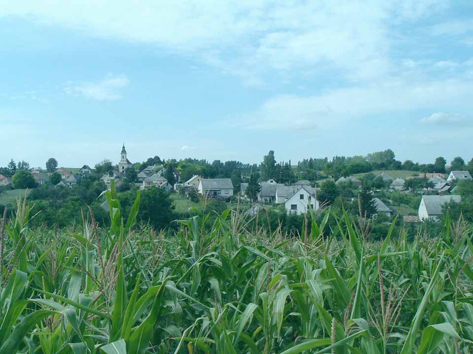 Szápár, Hungary